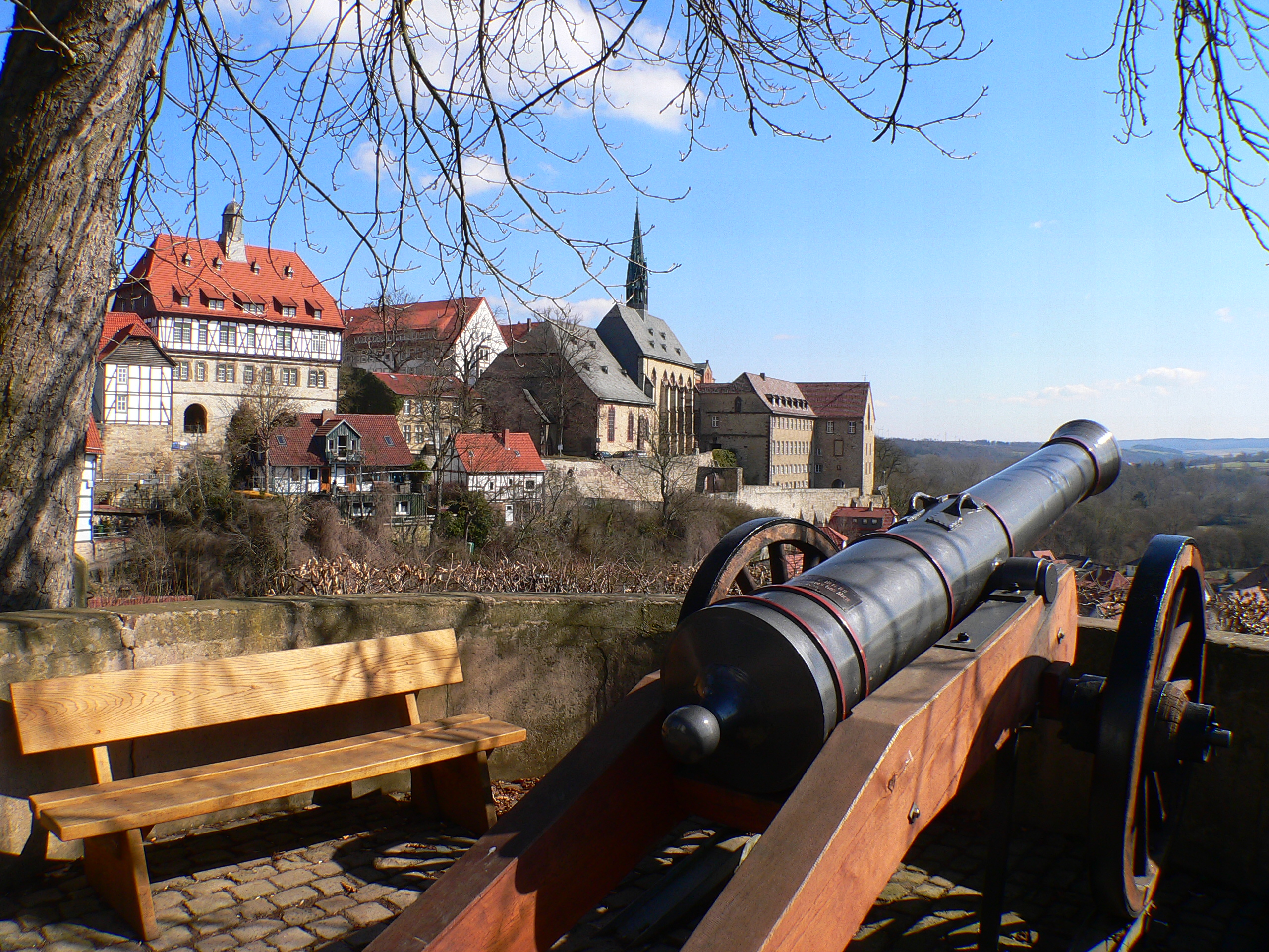 Warburg (Ortsansicht) in Nordrhein-Westfalen, Regierungsbezirk Detmold, Landkreis Höxter: Die 1525 vom Geschützmeister Manegold gegossene Fügeler-Kanone auf dem Burgrondel mit Blick über die Warburger Altstadt. Im Hintergrund zu sehen das Rathaus zwischen den Städten, die Altstadtkirche St. Maria in vinea (Maria im Weinberg) und das Gymnasium Marianum.